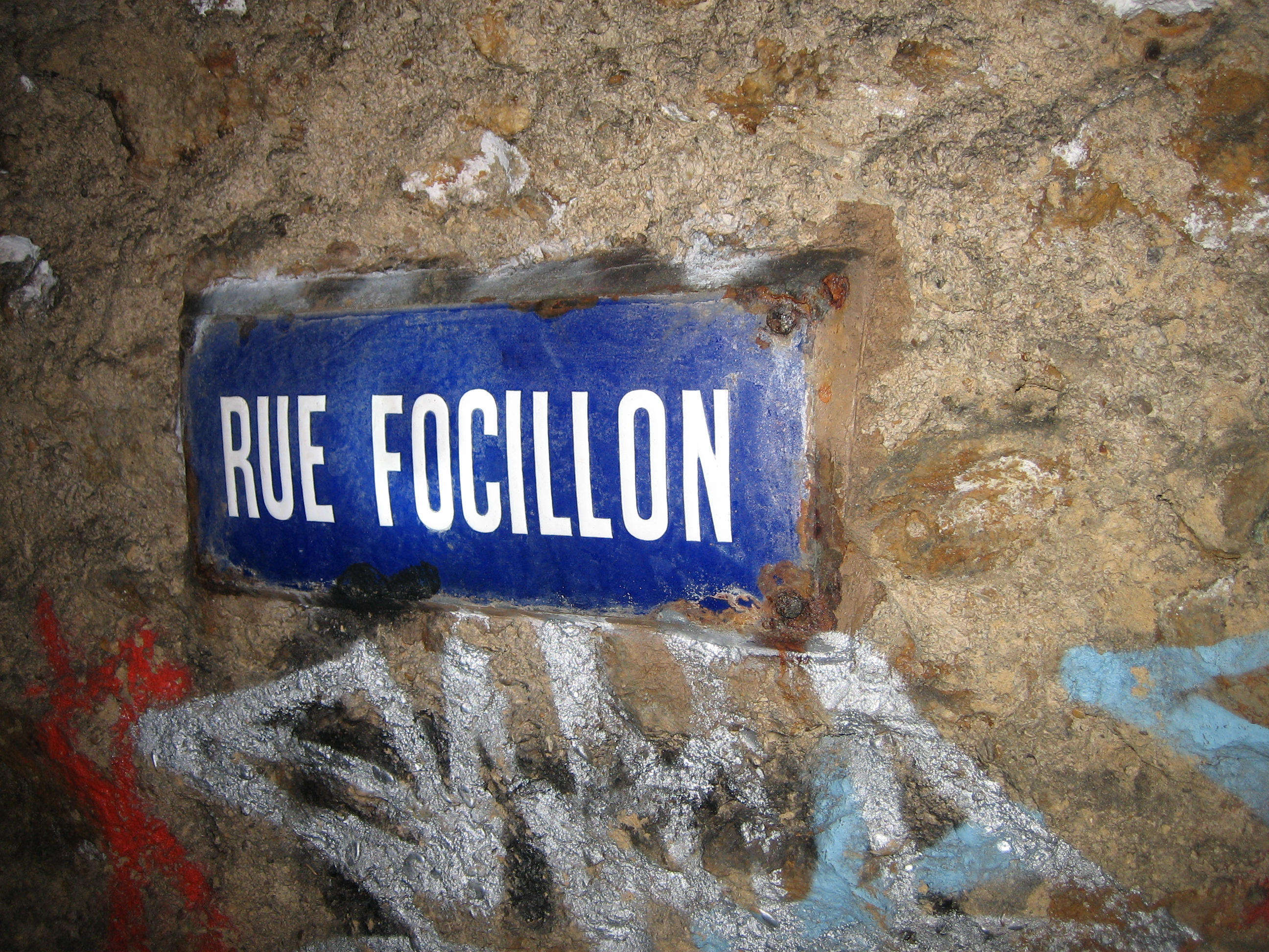 Promenade dans les catacombes de Paris, près du Charlety